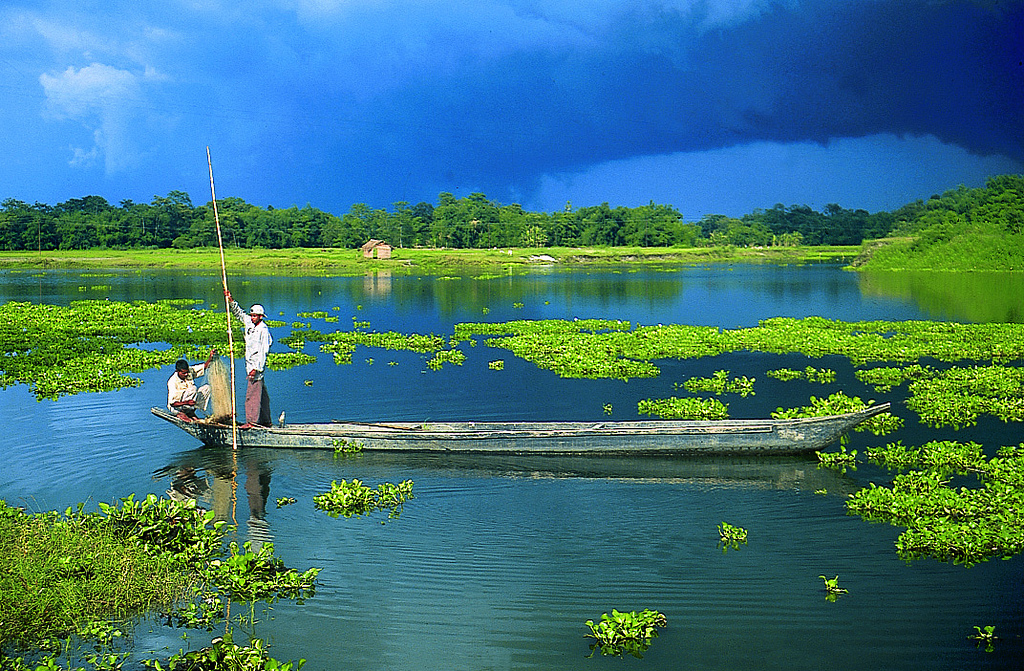 Majuli Island, Assam, India